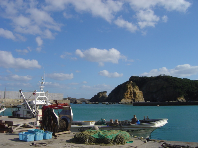 中種子町・平山漁港